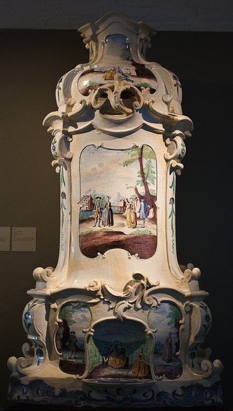 Kachel Kachel Duitsland, Stockelsdorf? circa 1780 ijzer, aardewerk met tinglazuur OKS 1978-18 De kachel bestaat uit een ijzeren onderkast waarop een aardewerken bovendeel in rococostijl is geplaatst. In aardewerk uitgevoerde kachels werden in verschillende Europese landen vanaf de middeleeuwen vervaardigd. Stove Duitsland, Stockelsdorf? circa 1780 iron, pottery with tinglaze OKS 1978-18 The stove consists of an iron base, on which a rococo-style top is placed. Earthernware stoves were produced in several European countries from the Middle Ages onward.